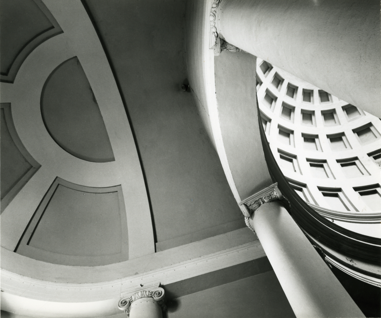 Servizio fotografico : Cesena, 1968 / Paolo Monti. - Stampe: 2 : Positivo b/n, gelatina bromuro d'argento/ carta, 24x30. - ((Al verso della stampa manoscritto i numero del negativo corrispondente: 502/43, 14746. Sul coperchio della scatola, manoscritto a pennarello: "Emilia Romagna".